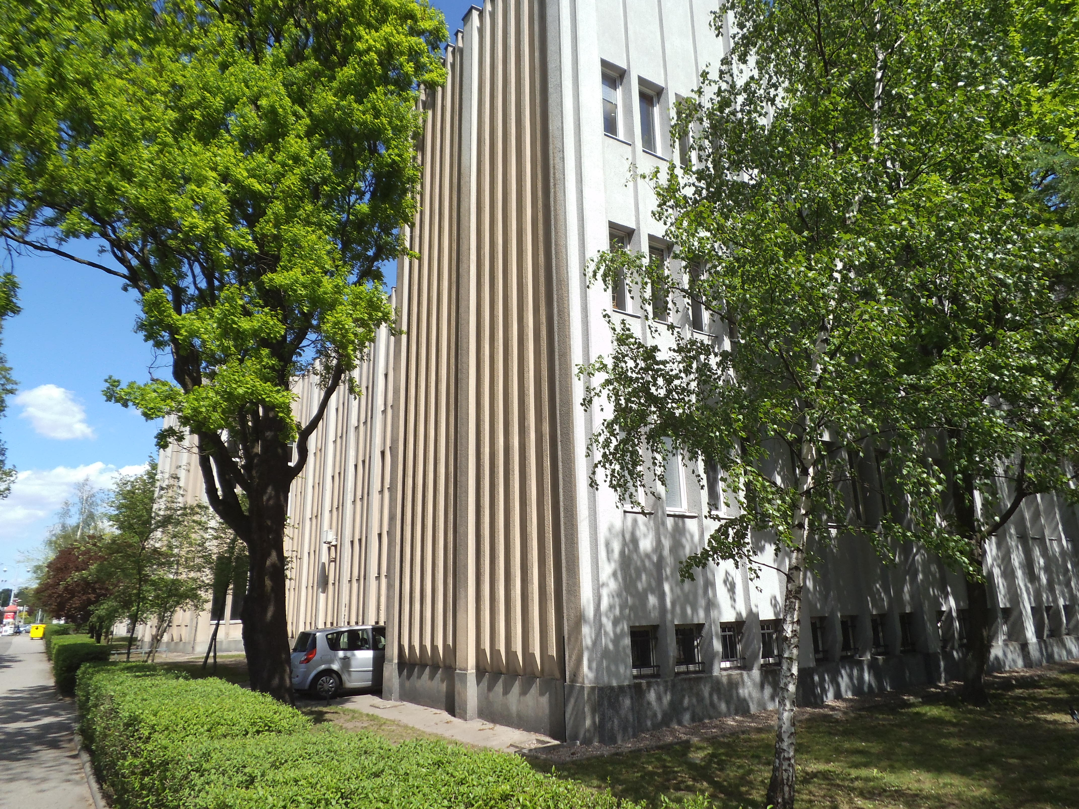 UMK torun